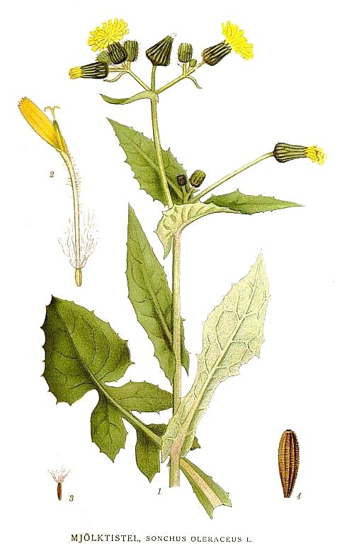 Original Description Mjölktistel, Sonchus oleraceus L.